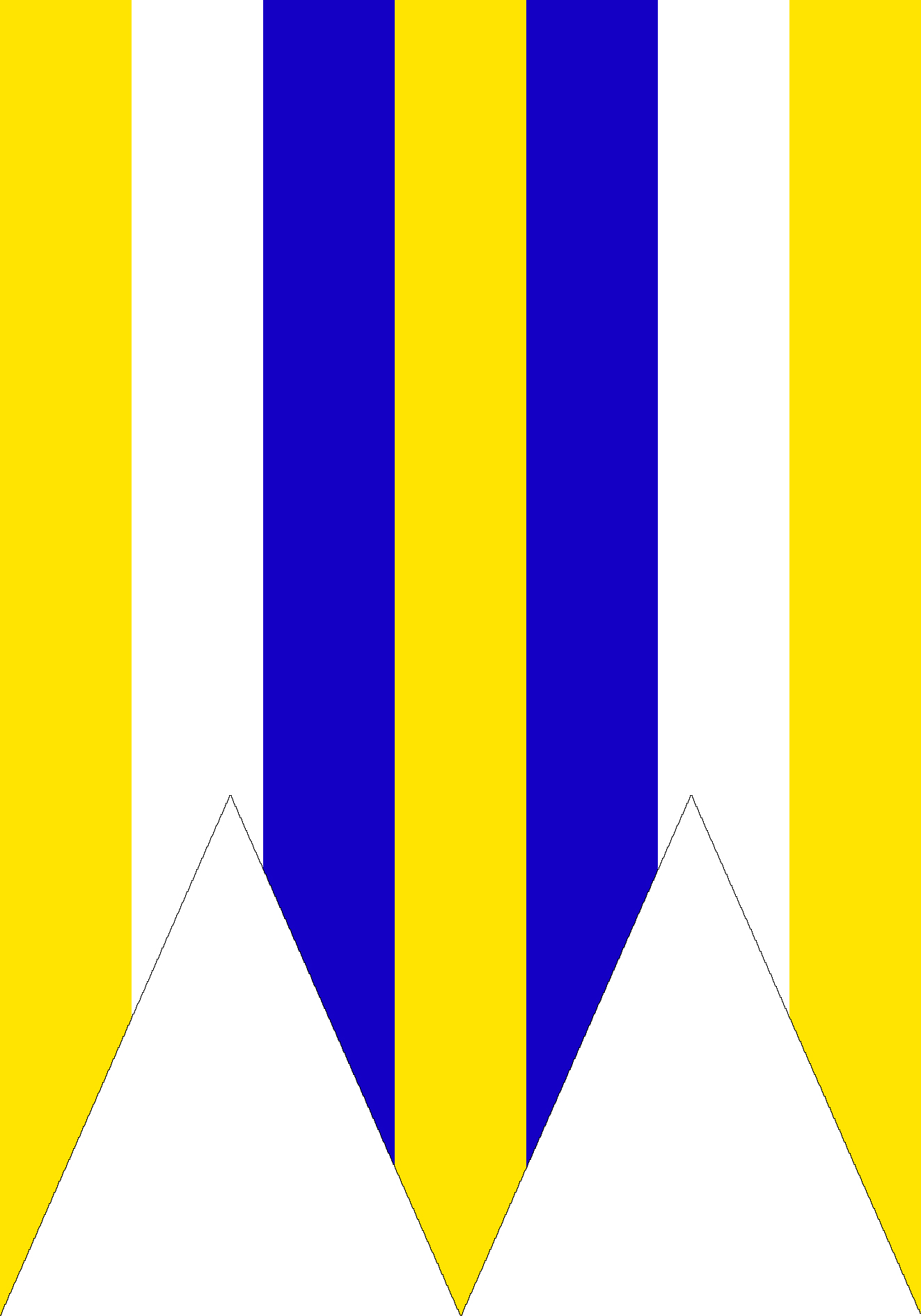 Vlajka obce Liptovská Porúbka.